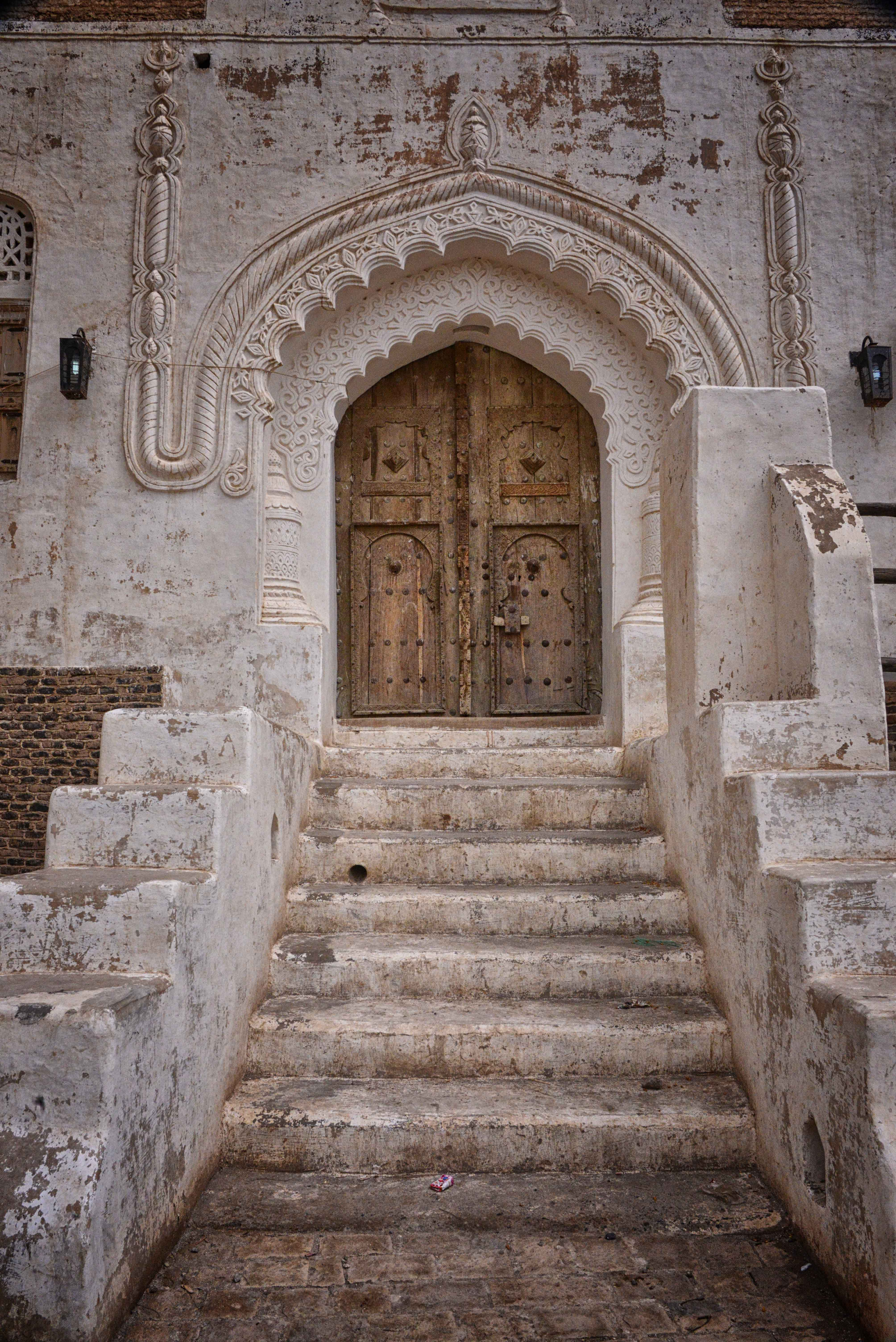 Entrance, Yemen